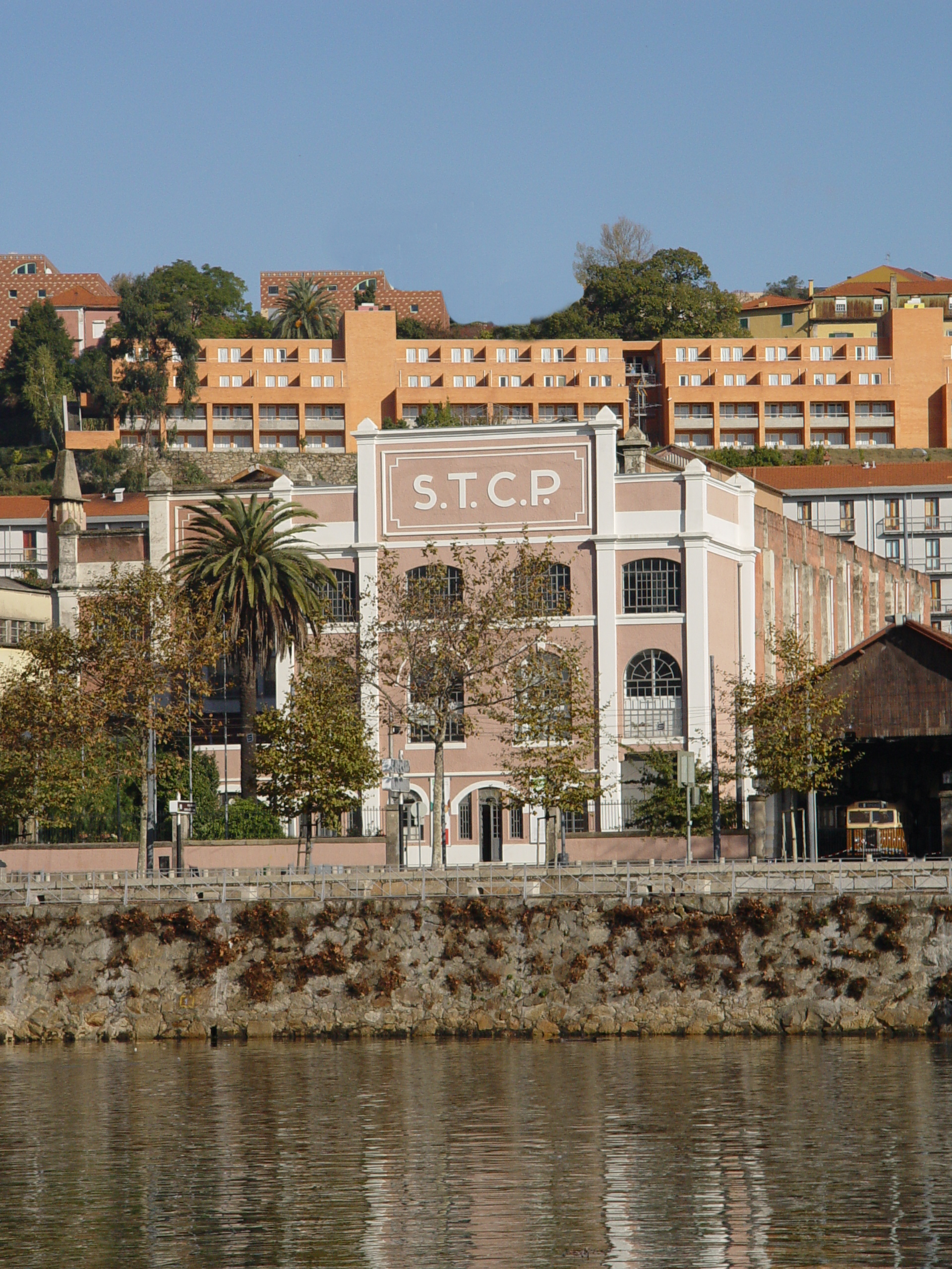 Carro Electrico Museum in Porto, Portugal